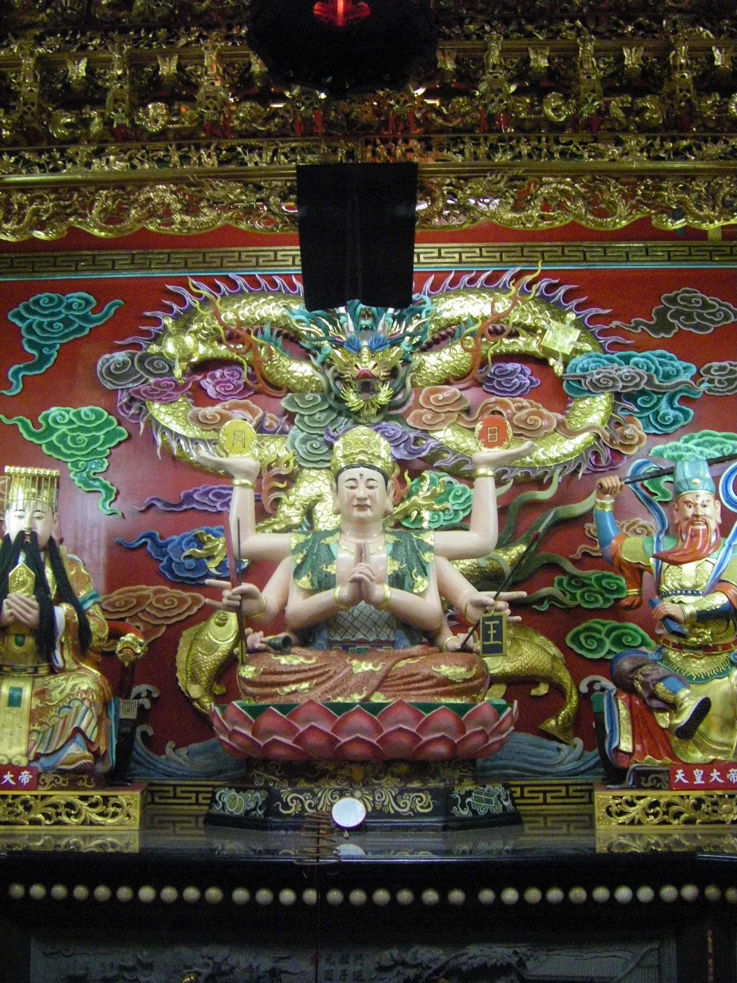 中文（台灣）: 岡山壽天宮供奉的斗姆元君